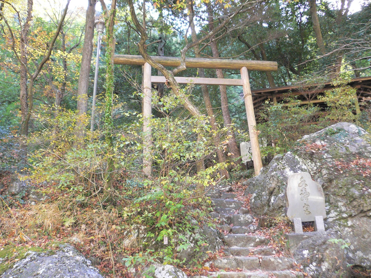 Tamagawa Suijinsha in Hatonosu Ravine, Okutama, Nishitama, Tokyo, Japan.